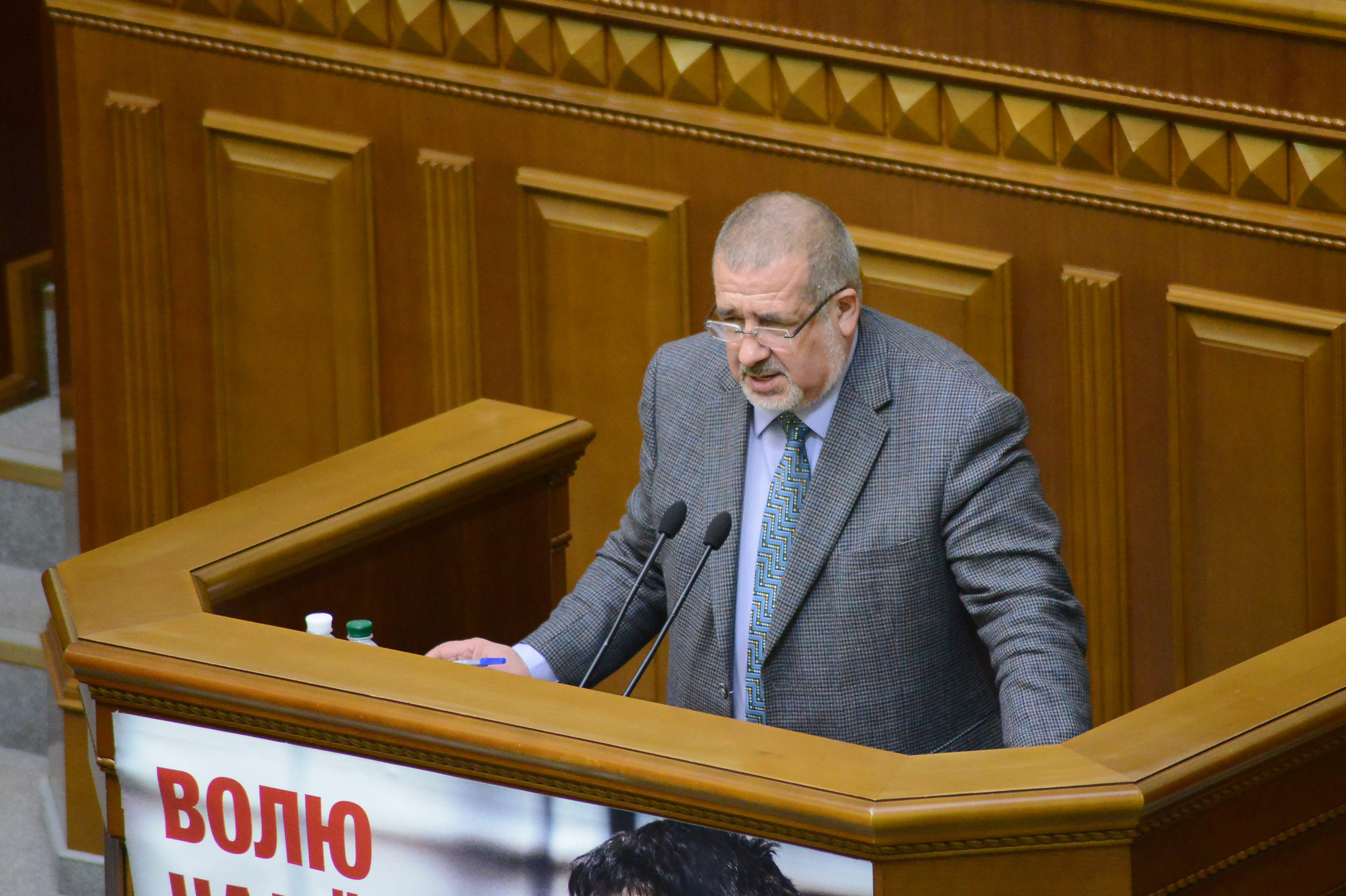 ВЕРХОВНА РАДА УКРАЇНИ 2015 фотограф Вадим Чуприна